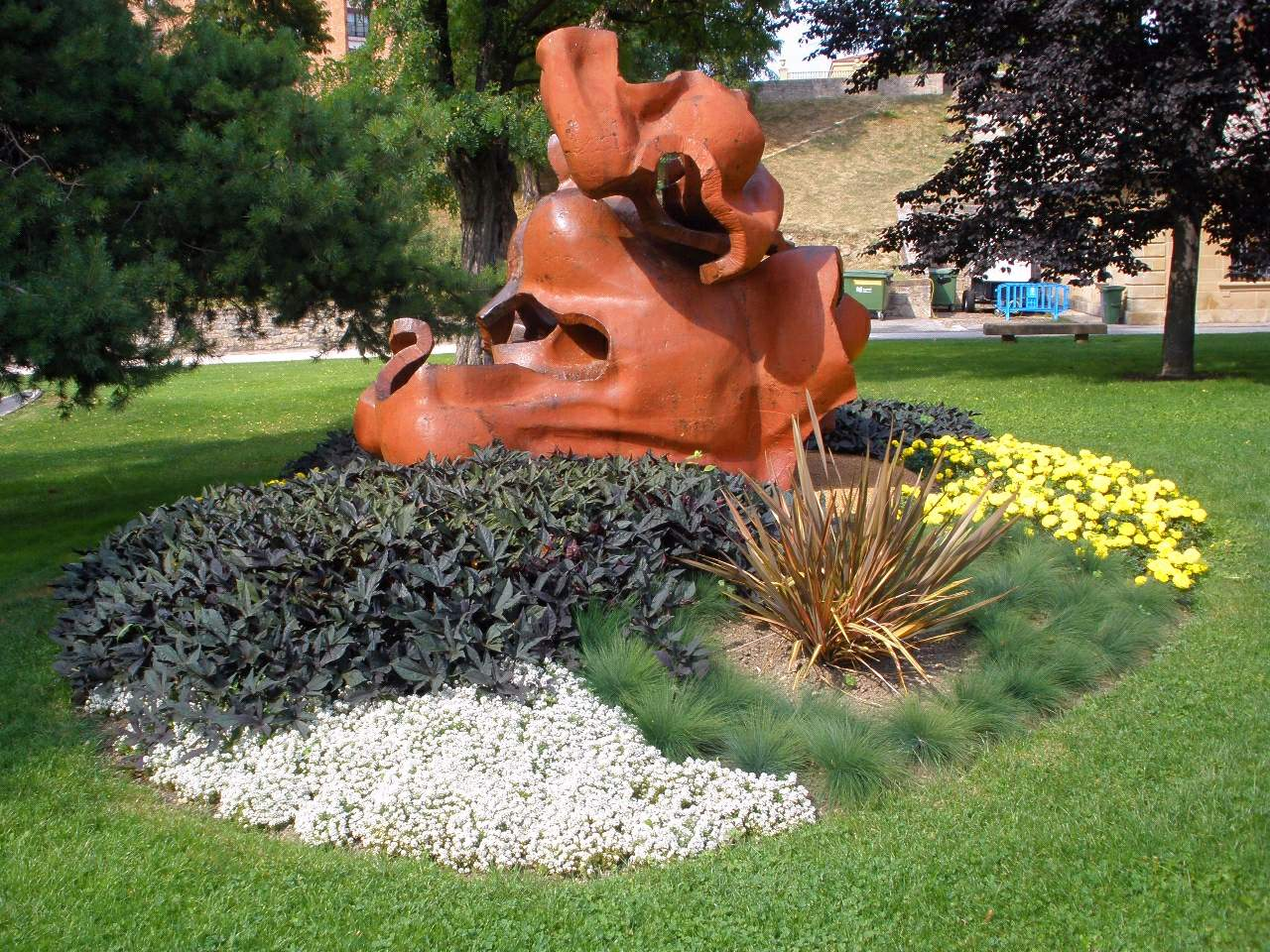 Ciudadela de Pamplona